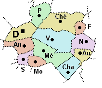 carte du canton de Danjoutin (Territoire de Belfort)